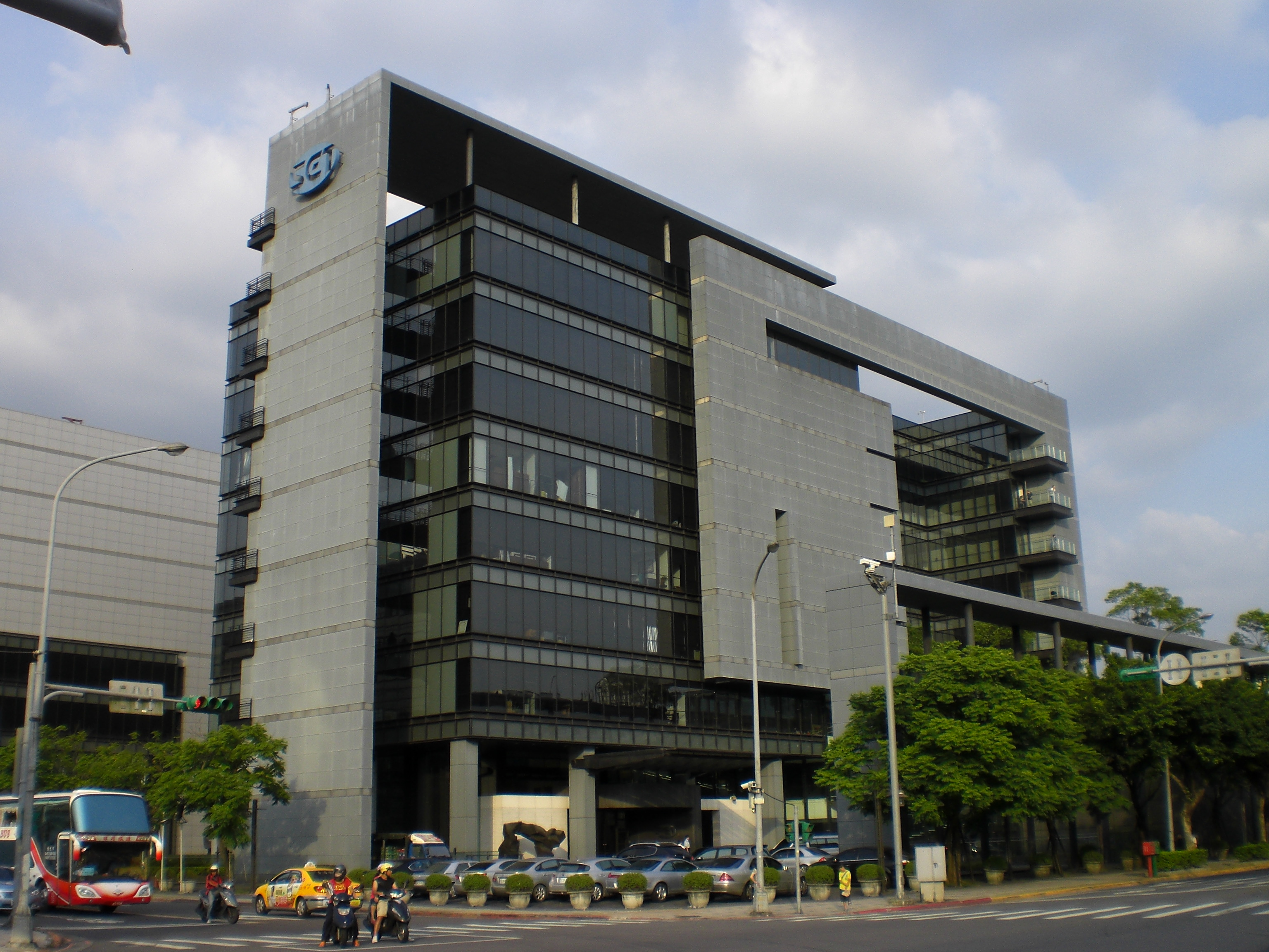 2012年7月13日的三立電視總部外觀之一